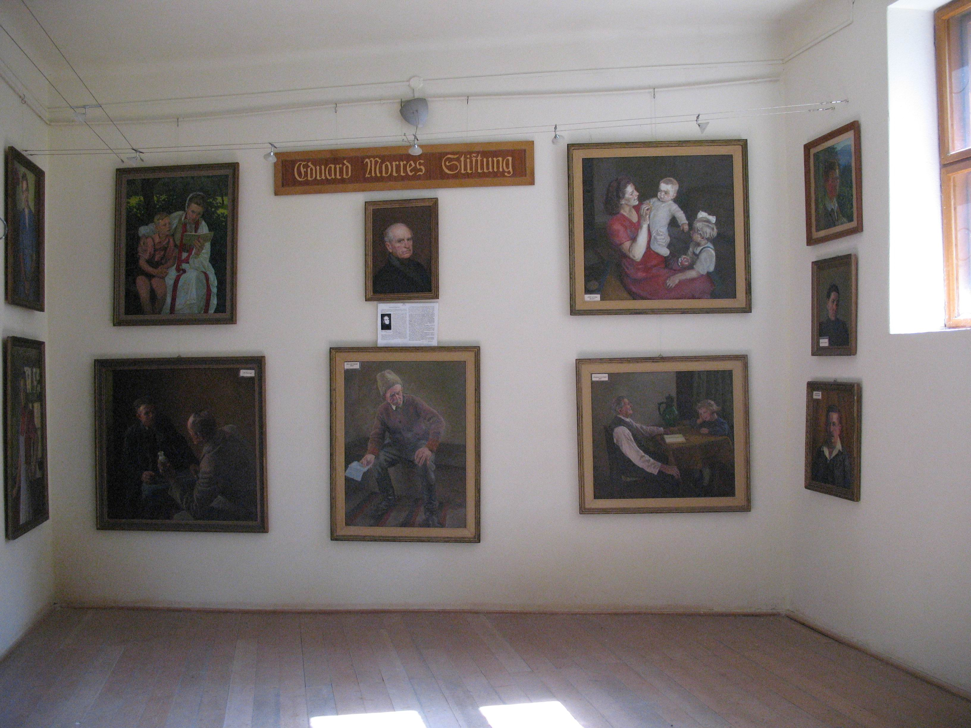 Ausstellungsraum der Eduard Morres-Stiftung in Codlea (Zeiden), Rumänien